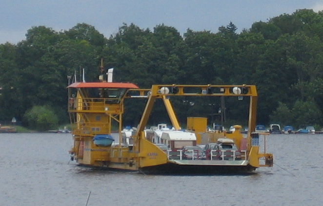 Line ferry in Ivösjön, Sweden